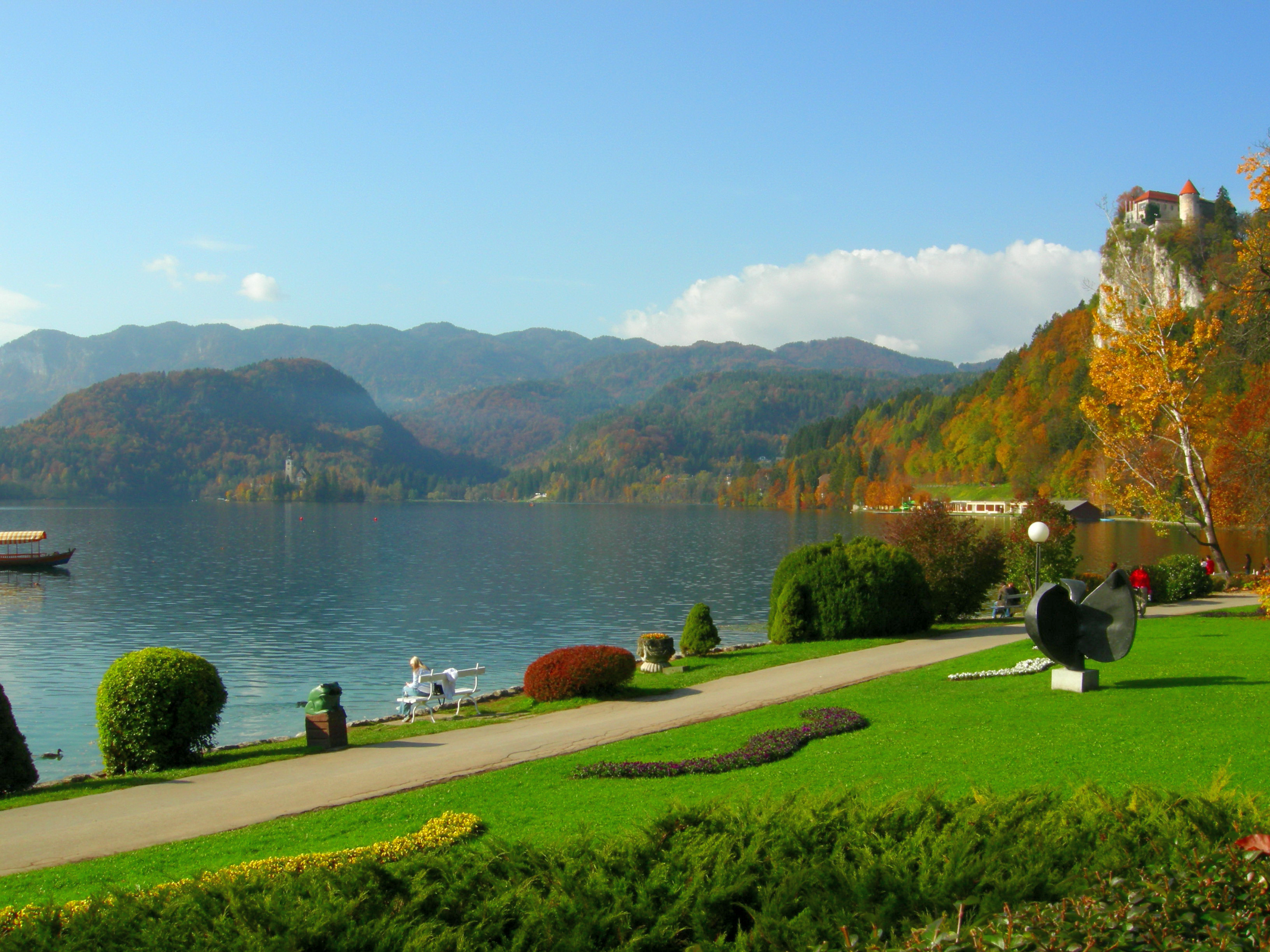 Lake Bled, Slovenia